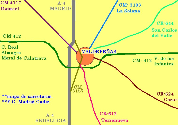 Valdepeñas, Spain. Road Map.